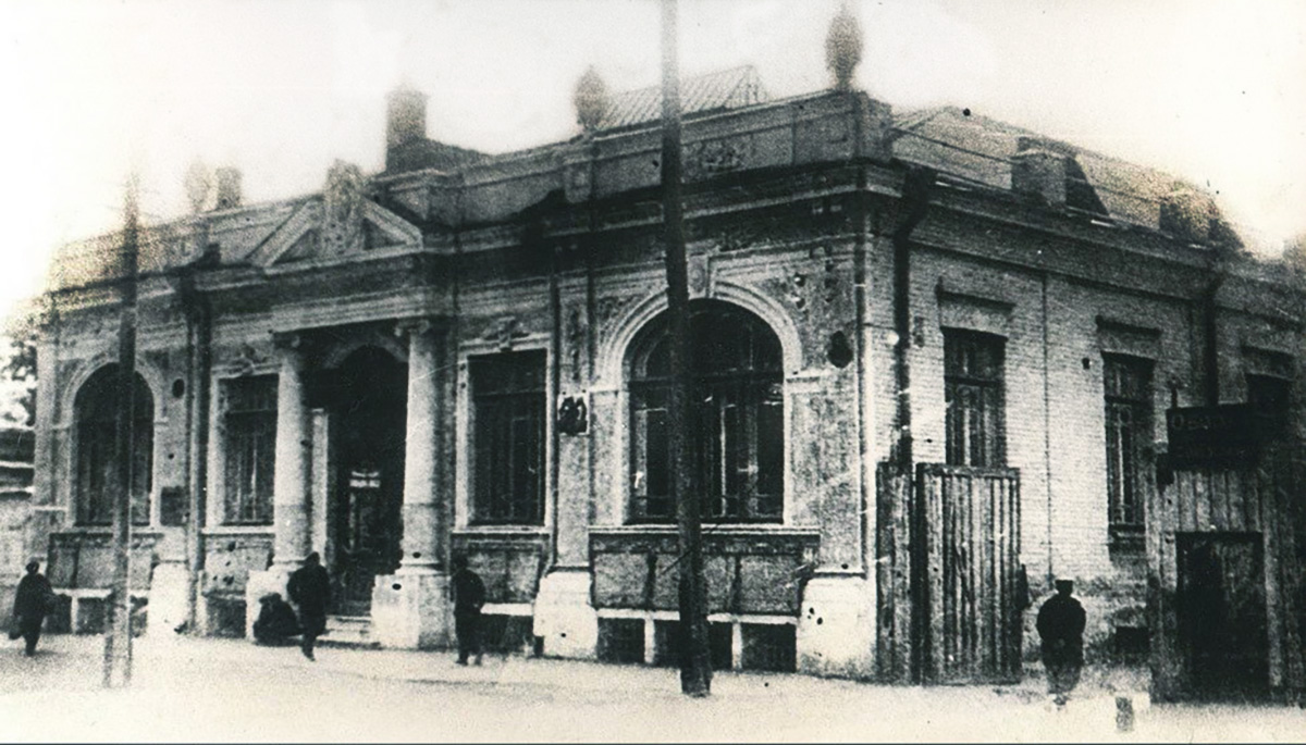 Будинок контори торгового дому «Т. М. Апштейн і сини», Київ, Спаська вул., 12